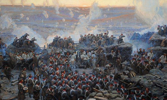 Assedio di Sebastopoli (1854-1855) particolare